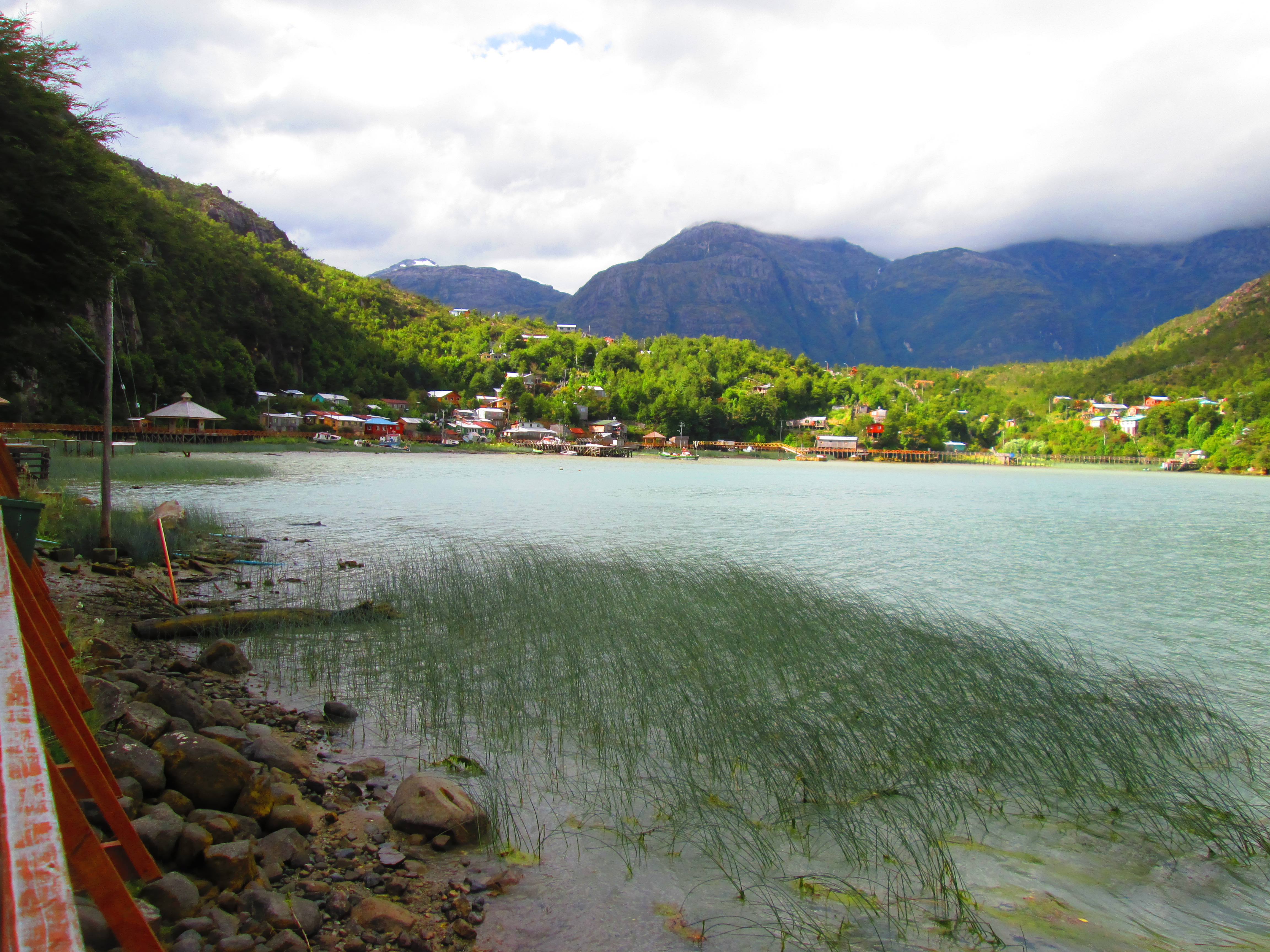 Sector Rincón y la bahía de Caleta Tortel, región de Aysén.